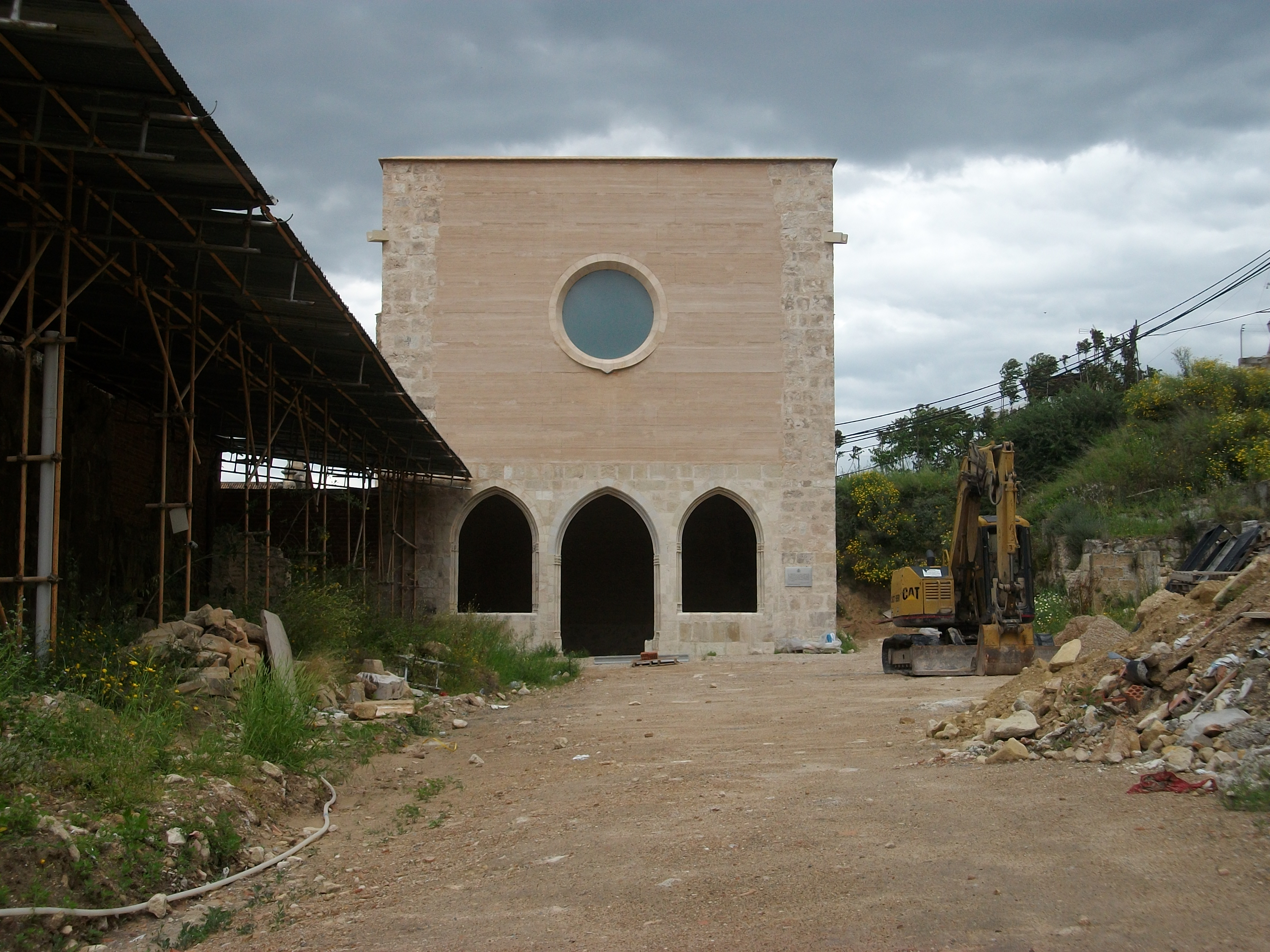 Aula capitular del Convent de Sant Doménec de Xàtiva, gòtica, restaurada recentment.